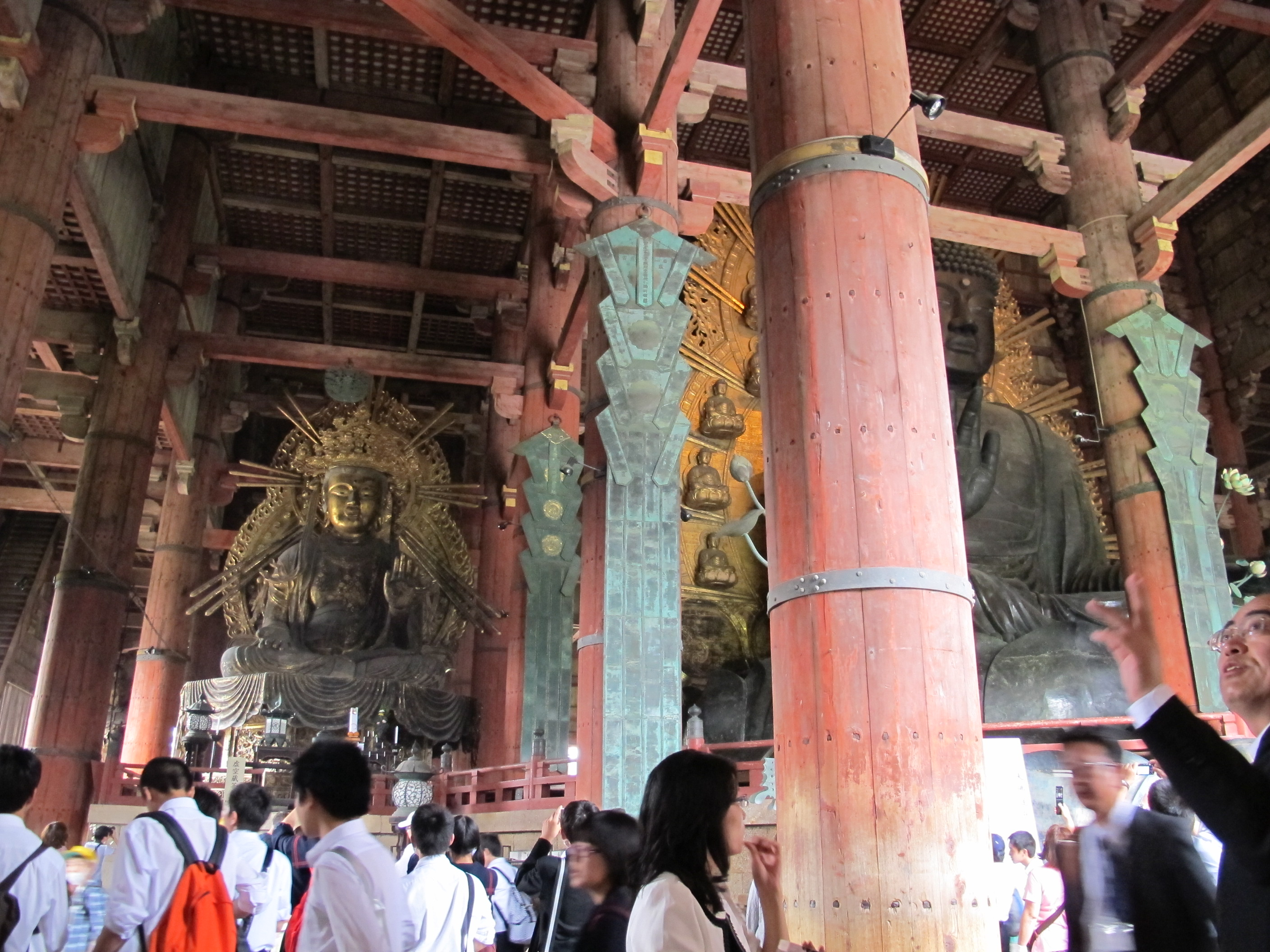 Nara, todai-ji